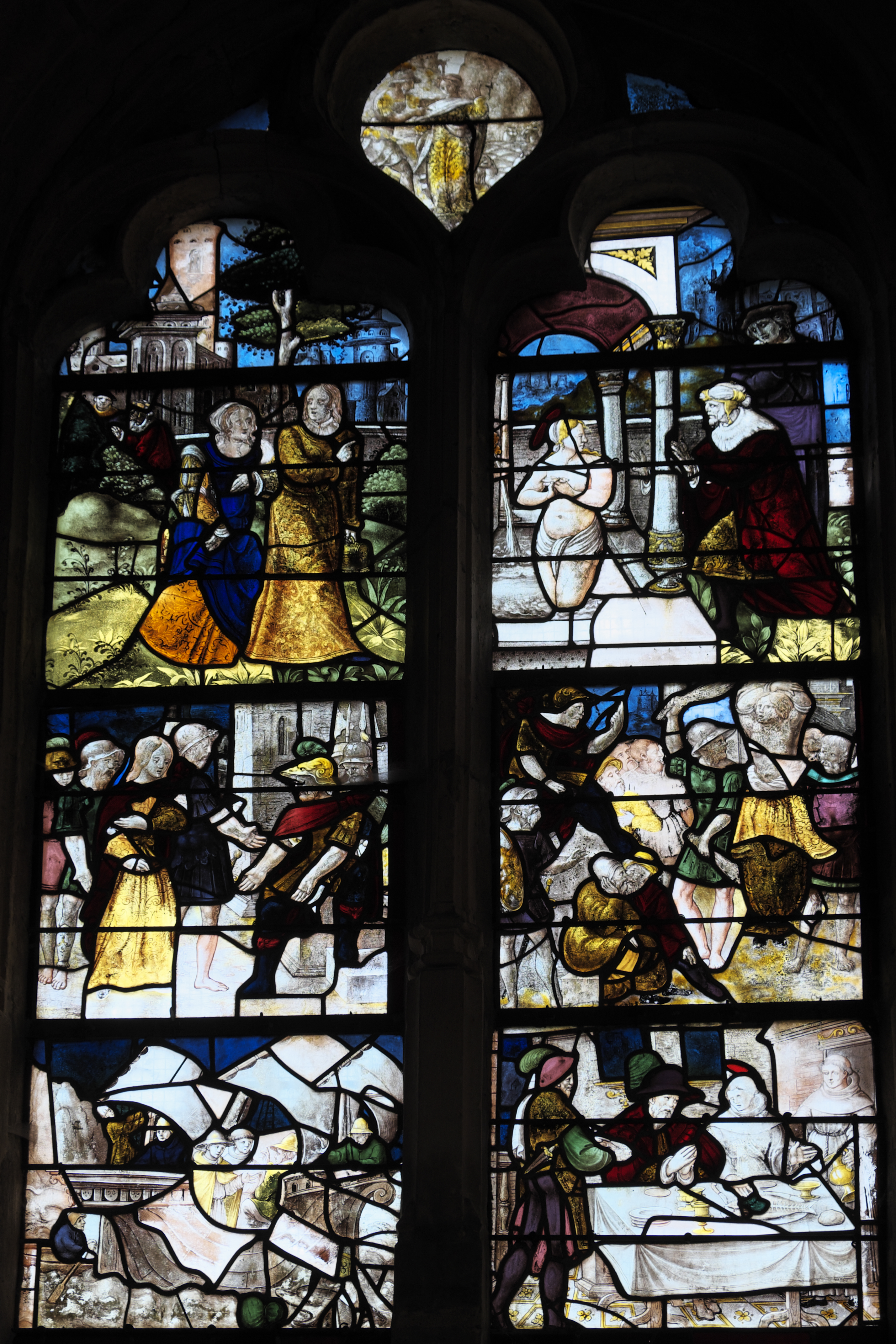 Katholische Kirche Saint-Germain-d’Auxerre in Coignières im Département Yvelines (Île-de-France/Frankreich), Bleiglasfenster aus dem 16. Jahrhundert; Darstellung: Susanna und die Greise